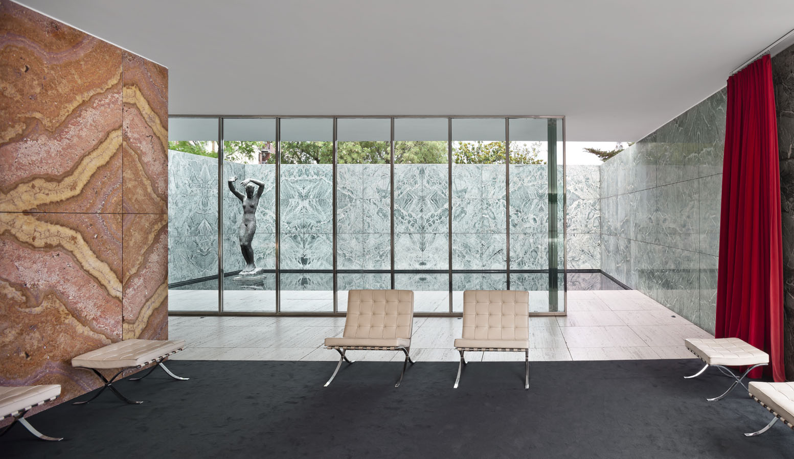 Georg Kolbes Skulptur stand ursprünglich als Gips im Bassin des Pavillons.